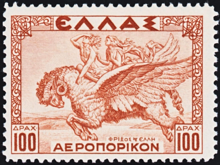 Фрикс и Гелла на крылатом баране. Греческая марка из серии, посвященной началу авиации